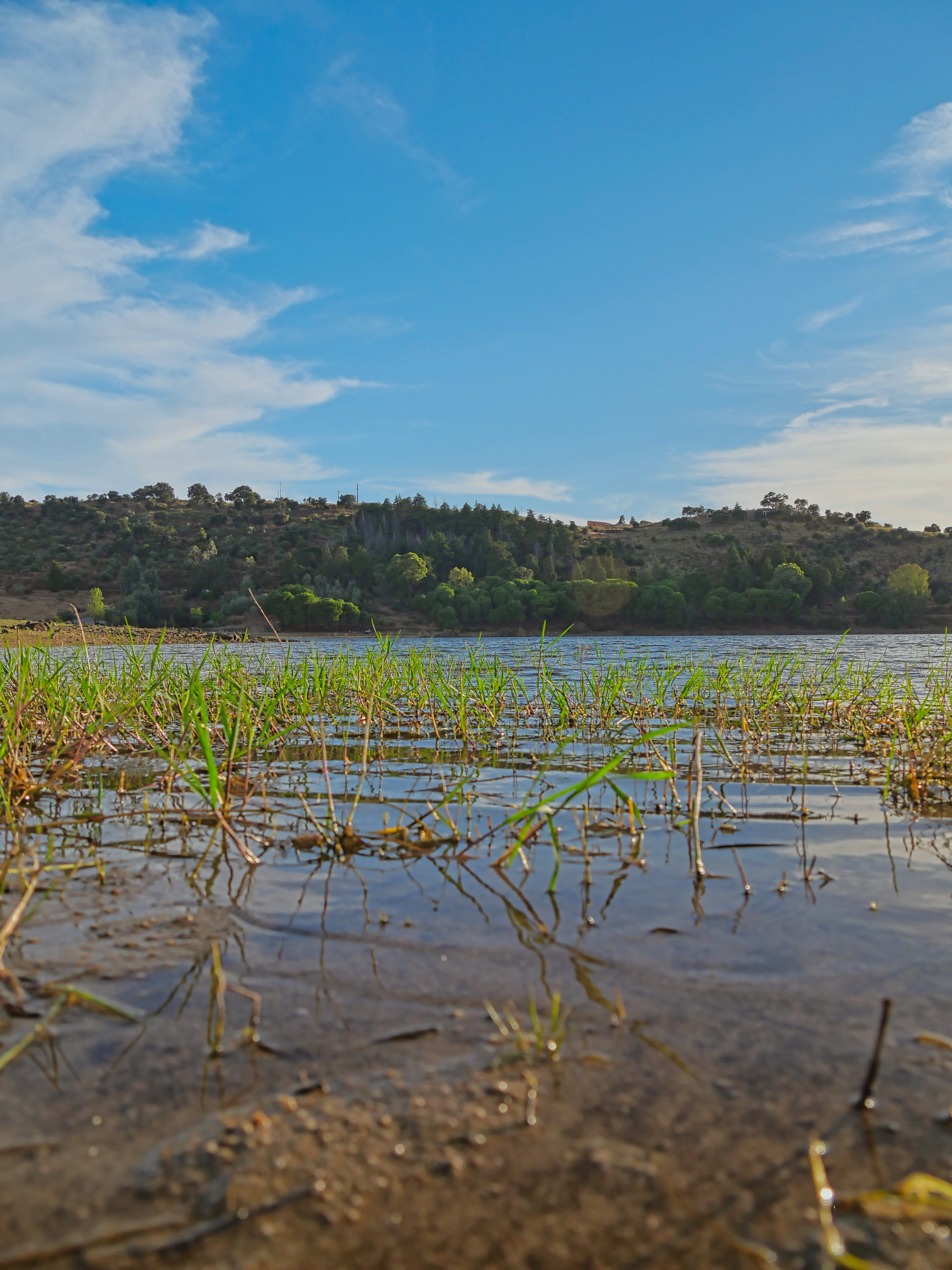 Barragem Marechal Carmona - Idanha-A-Nova - Portugal